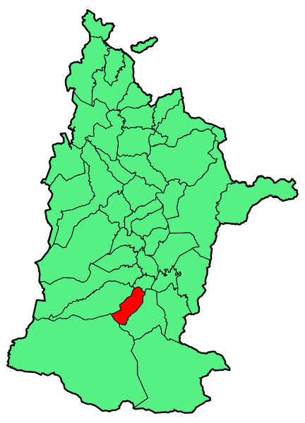 Aipaturiko udalerriaren kokapena Zuberoan